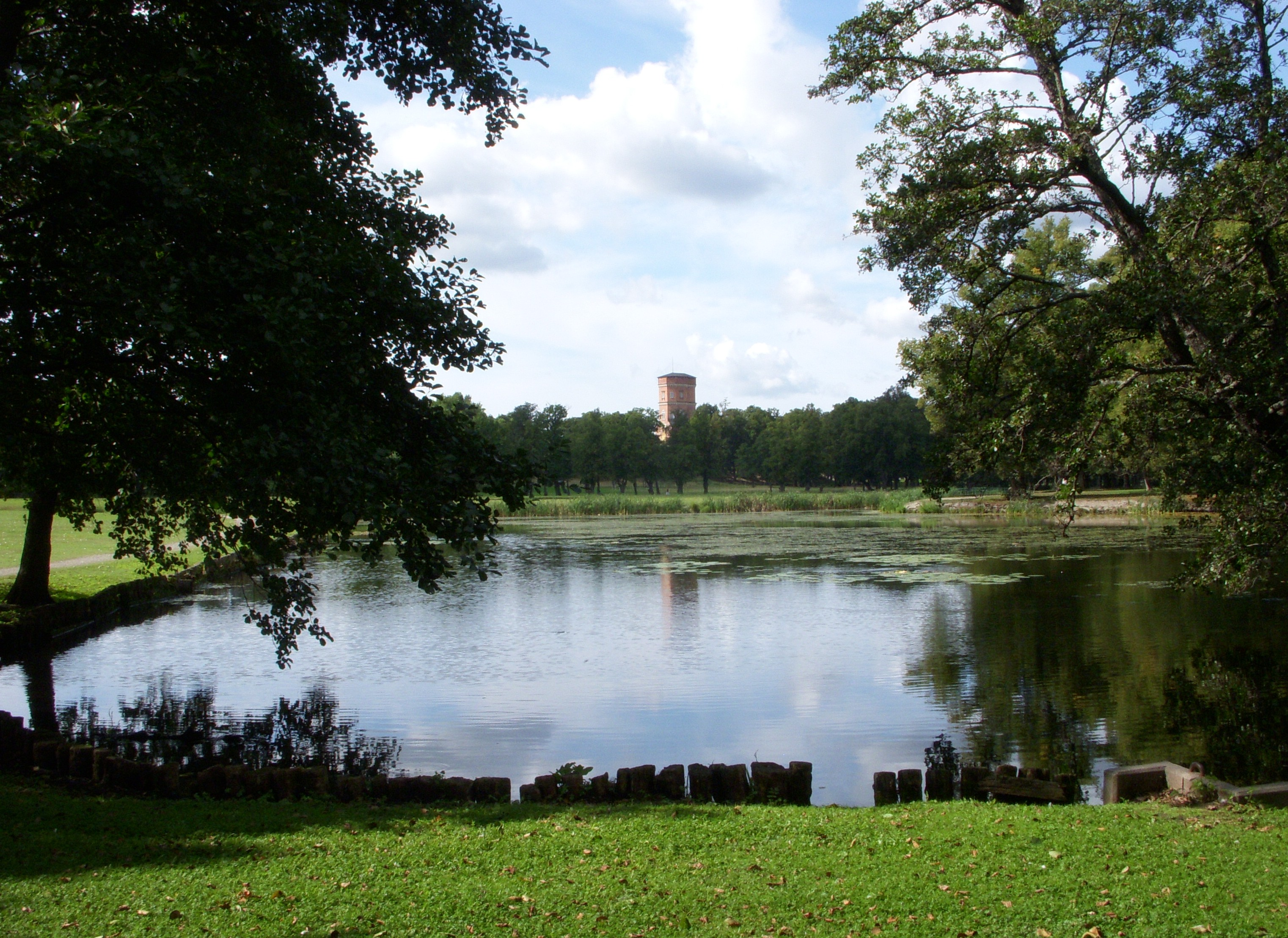 Drottningholn, Götiska tornet, sett från engelska parken